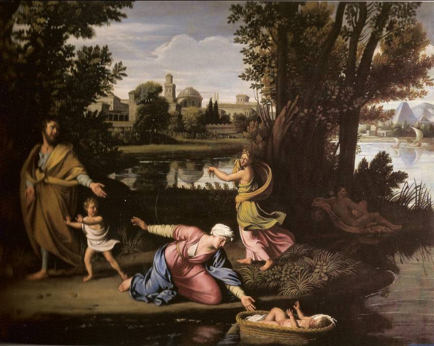 Moïse exposé sur les eaux